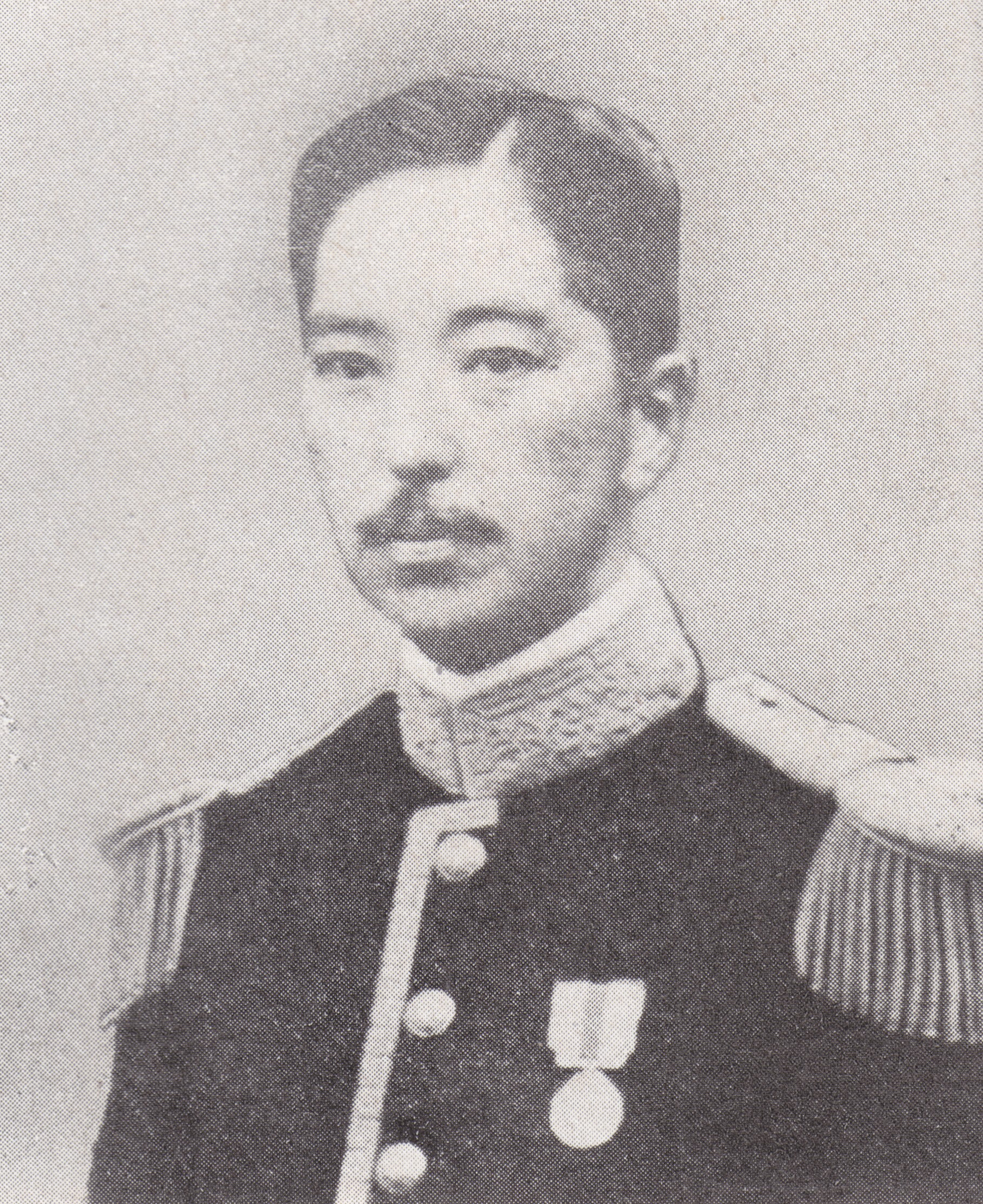 子爵竹屋春光